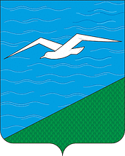 Герб города Анива, Сахалинская область